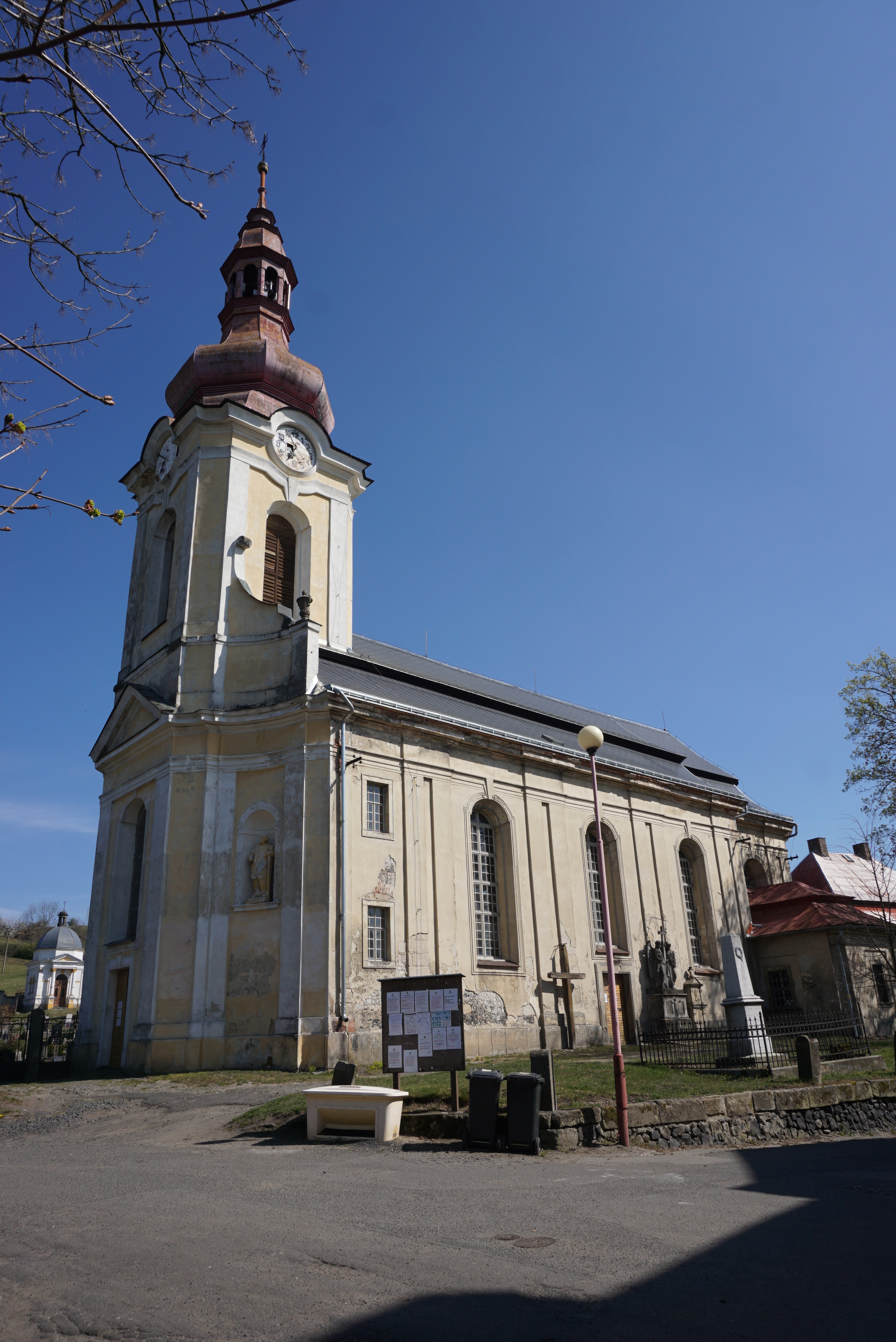 Kostel svatých Petra a Pavla, Volfartice.